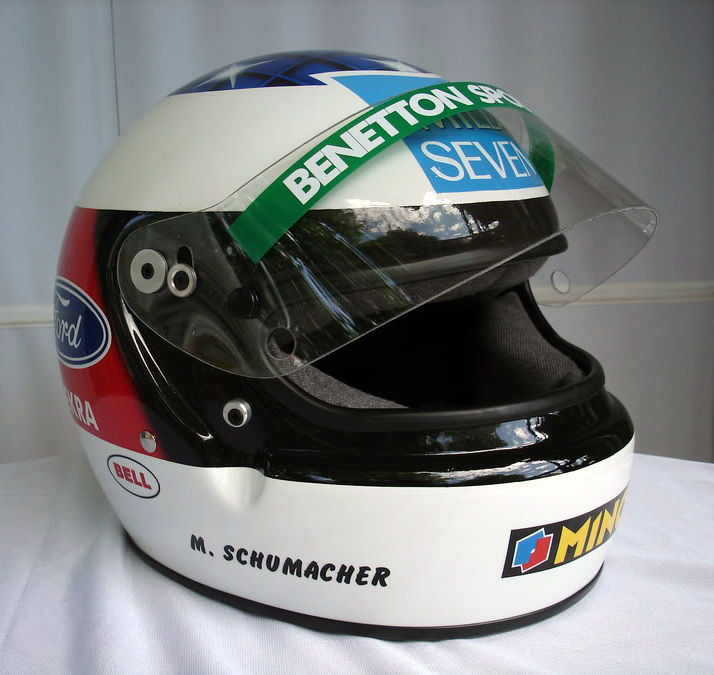 Helm Michael Schumacher di musim 1994